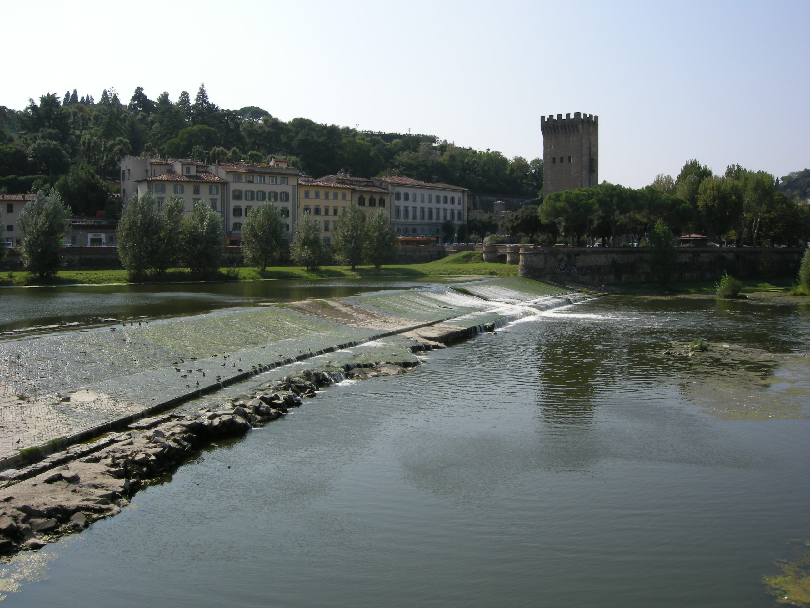 Firenze, pescaia di san niccolò